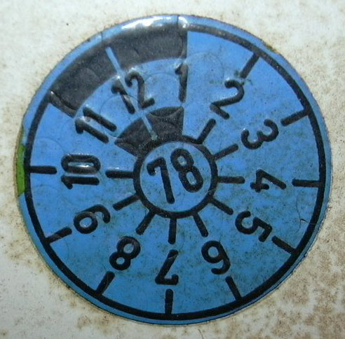 Ältere TÜV-Prüfplakette mit alter Ableserichtung